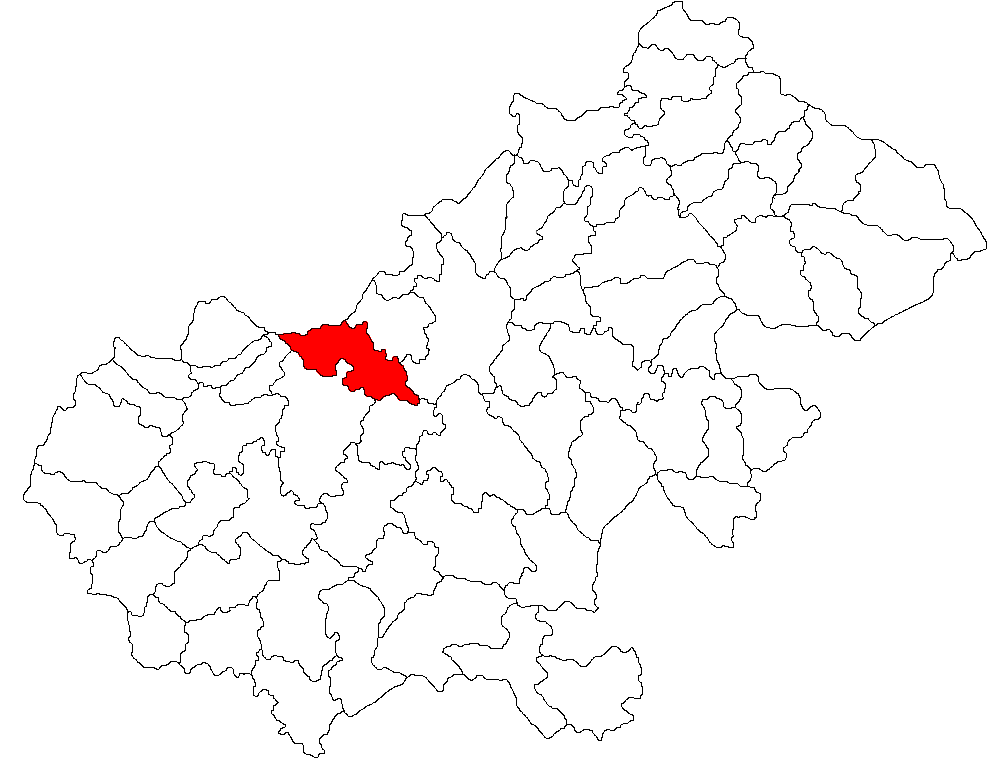 Categorie:Hărţi ale judeţului Satu Mare